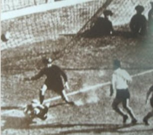 Famoso Gol de Severino Varela (Boca Juniors) a River Plate, de "palomita".